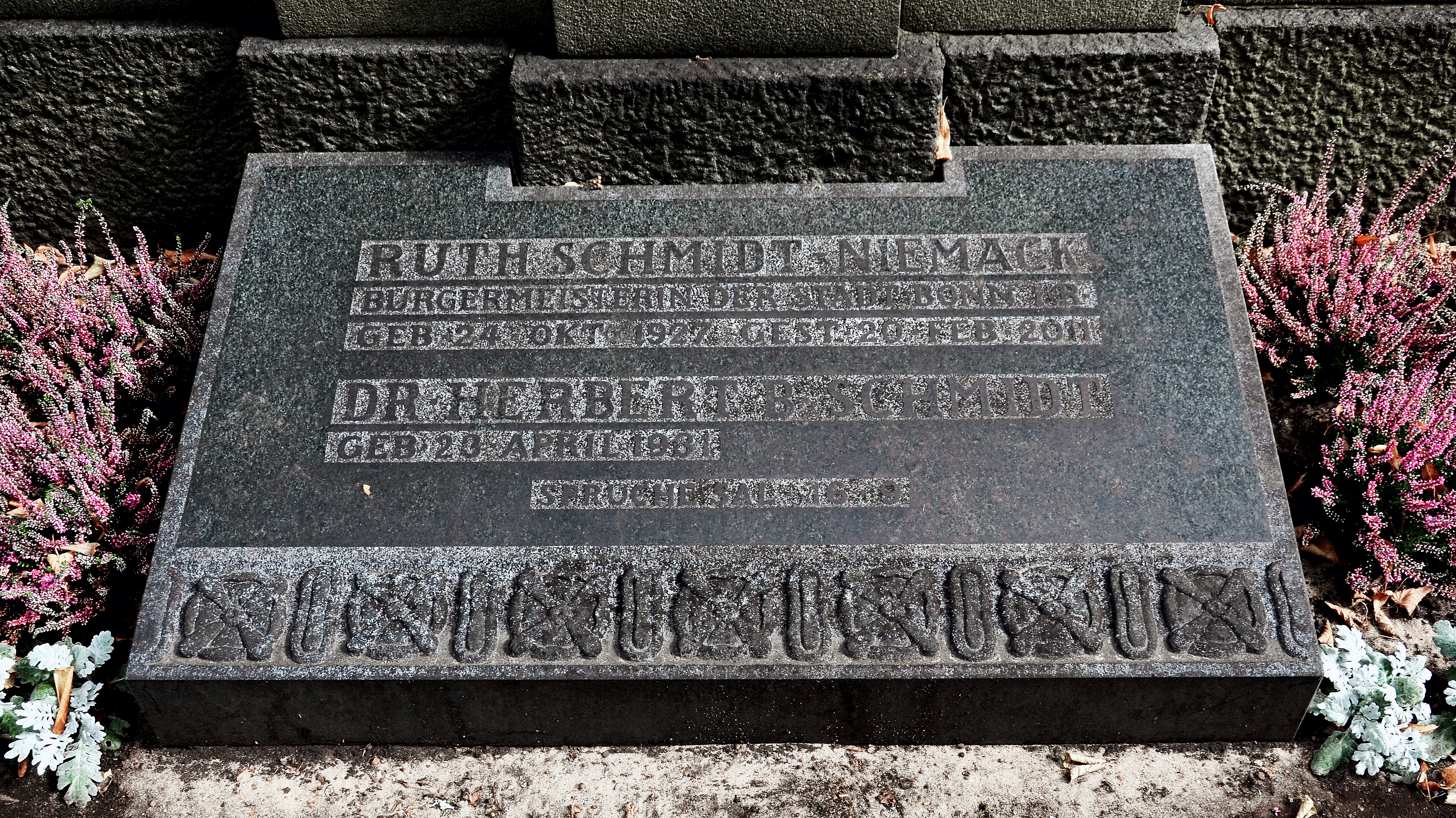 Grabsteine an der Aussenmauer zur Orli-Wald-Allee auf dem Stadtfriedhof Engesohde in Hannover mit der Familiengrabstätte „Ruth Schmidt-Niemack / Bürgermeisterin der Stadt Bonn / geboren 24. Oktober 1927, gestorben 20. Februar 2011“ sowie „Dr. Herbert B. Schmidt / geboren 20. April 1931 ...“ ...